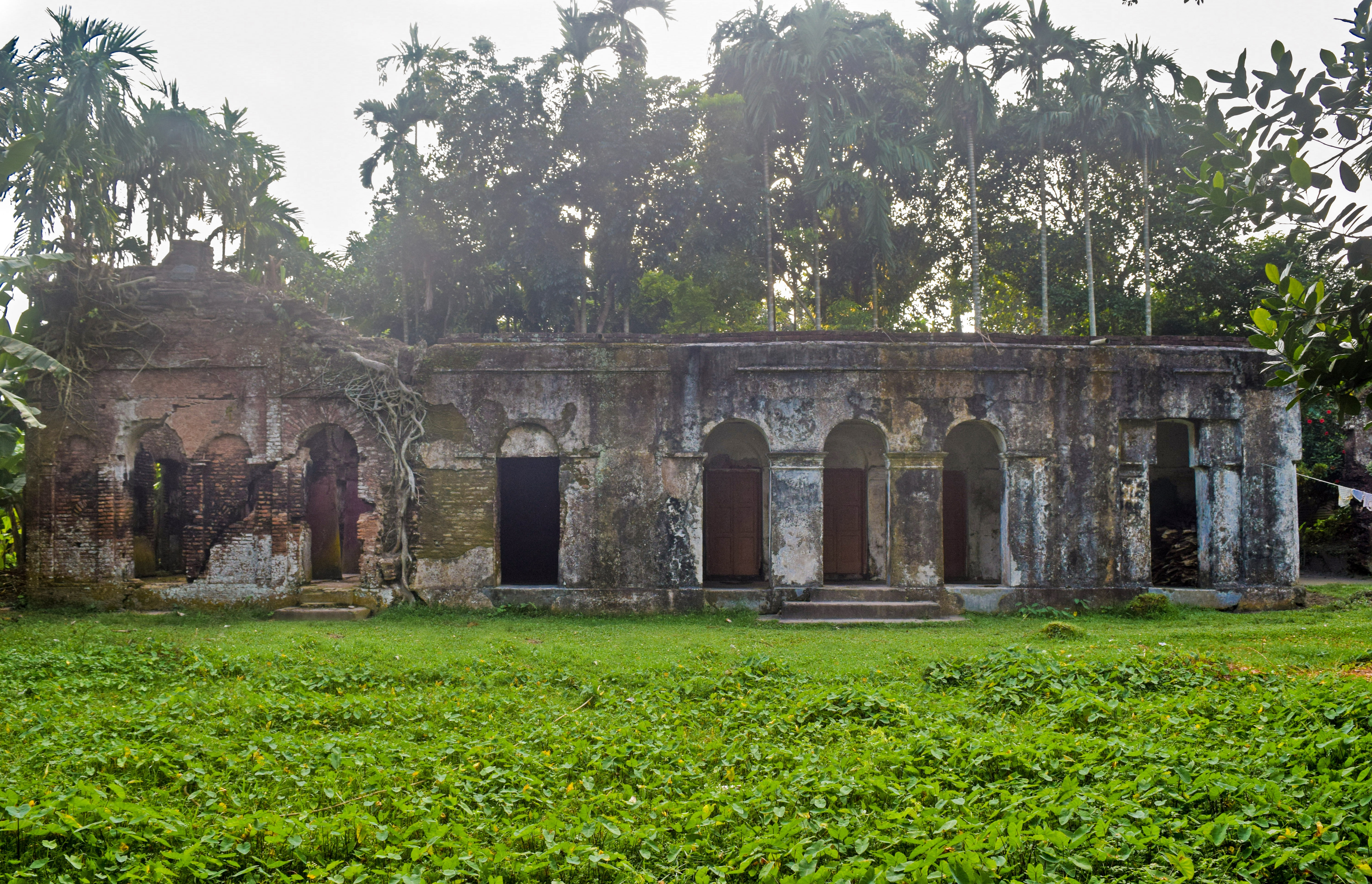 ঈশা খাঁর জঙ্গলবাড়ি